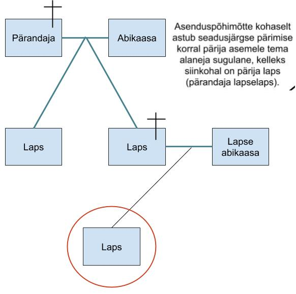 Asenduspõhimõte